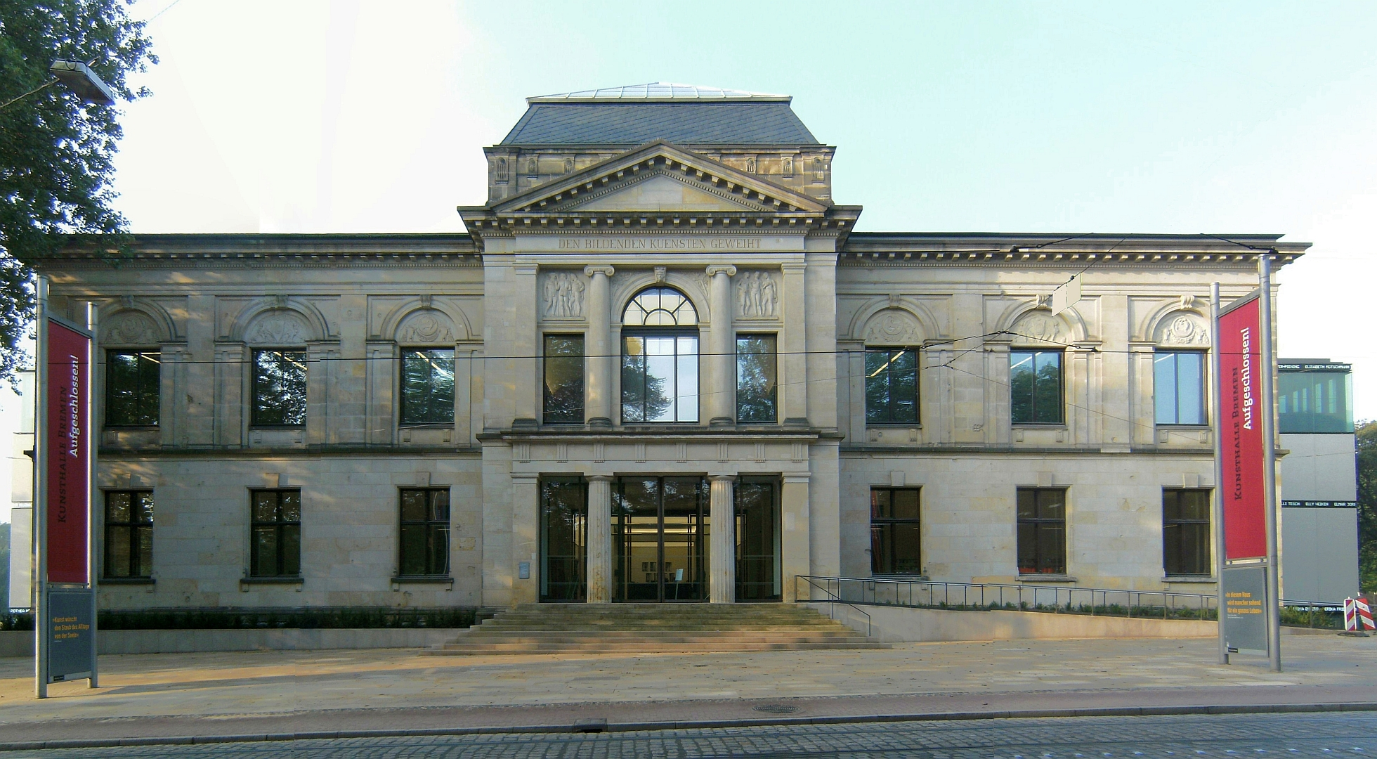 Kunsthalle in Bremen, Am Wall 207.Das abgebildete Objekt ist ein geschütztes Kulturdenkmal in der Freien Hansestadt Bremen, mit der Nr. 0084 beim Landesamt für Denkmalpflege registriert.